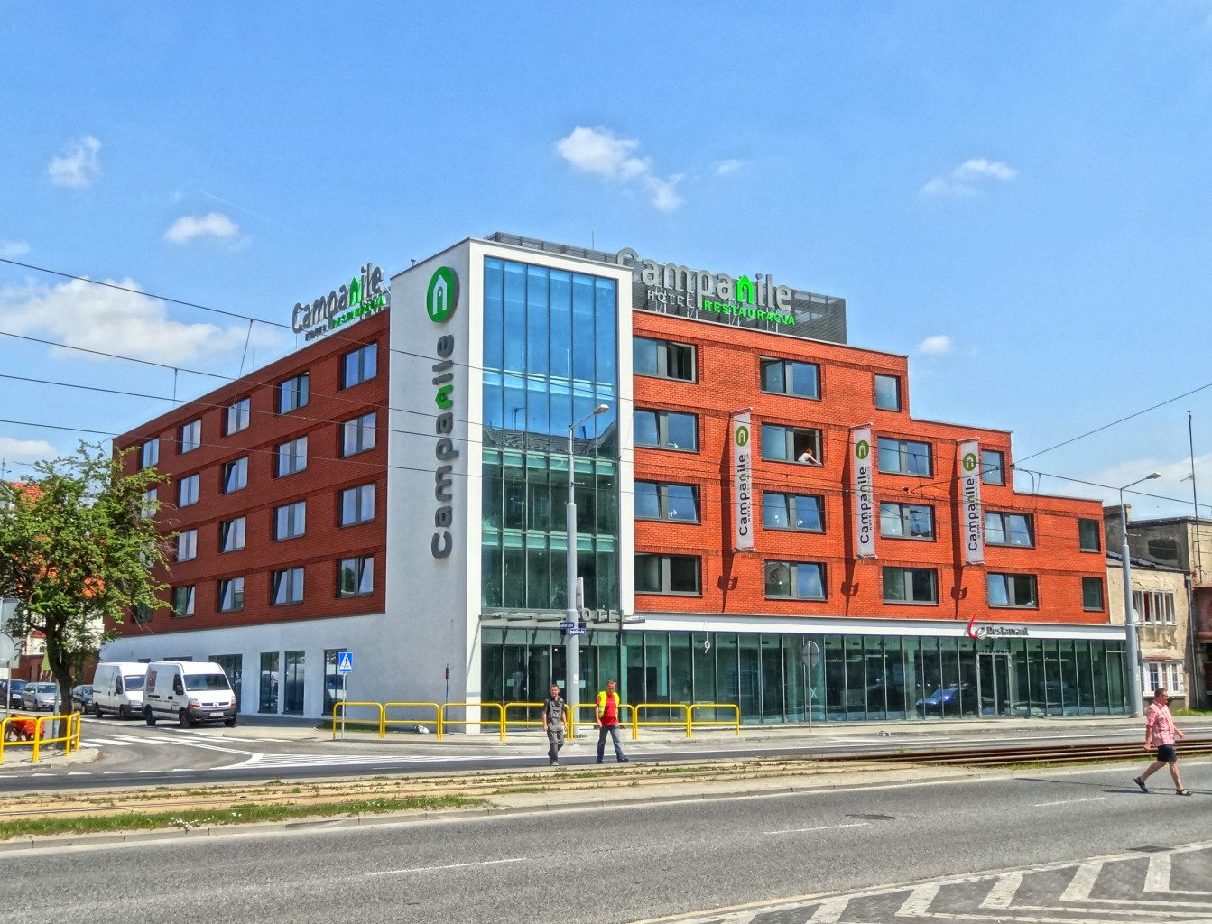 Hotel sieci Campanile w Bydgoszczy przy ul. Jagiellońskiej